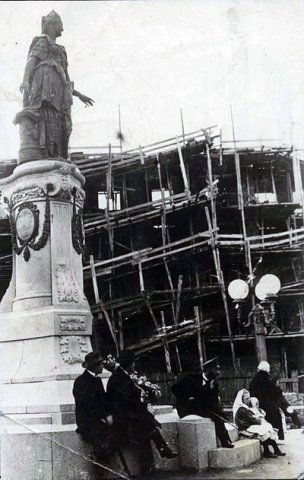 Строительство первого корпуса Национального горного унив-та